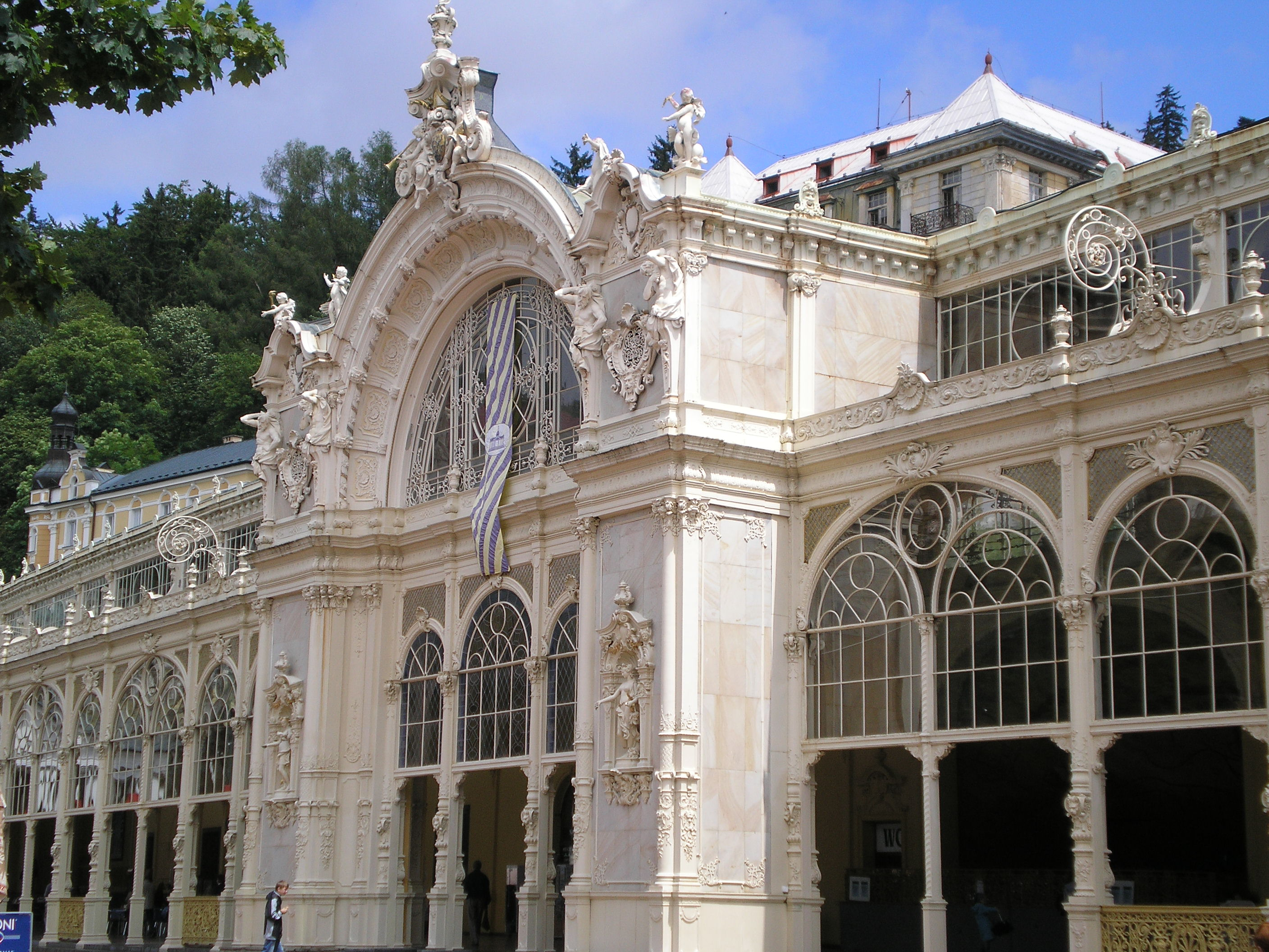 Colonnade in Mariánské Lázně, Czech republic